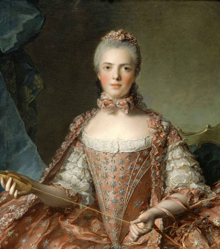 Marie Adélaïde de France, known as Madame Adélaïde (1732–1800), daughter of Louis XV and Marie Leszczyńska